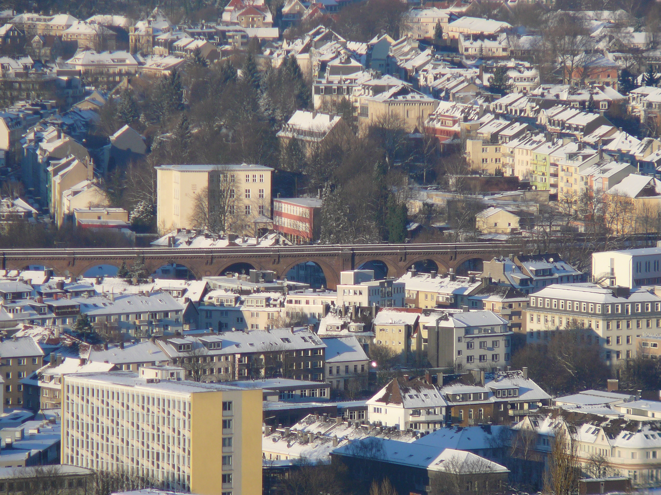 Obere Lichtenplatzer Straße, Wuppertal